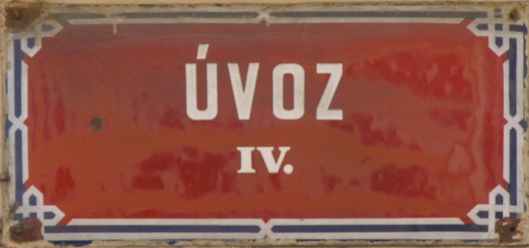 Praha, Hradčany - Úvoz (smaltová cedule)